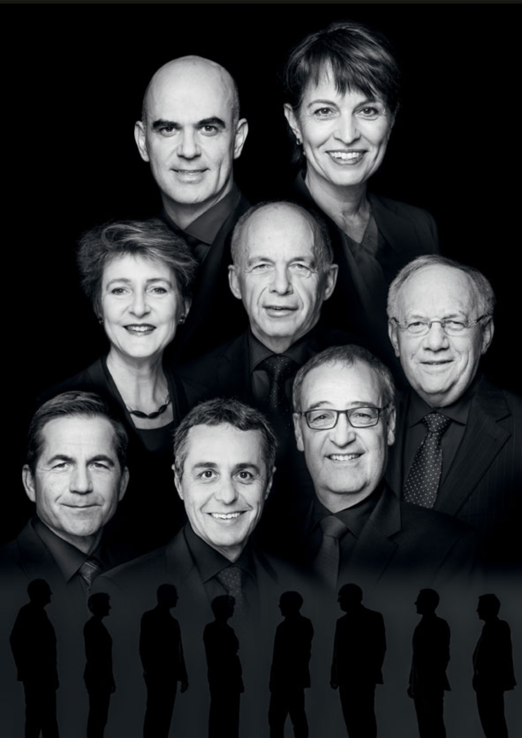 Conseil fédéral suisse, avec Ignazio Cassis remplaçant D.Burkhalter